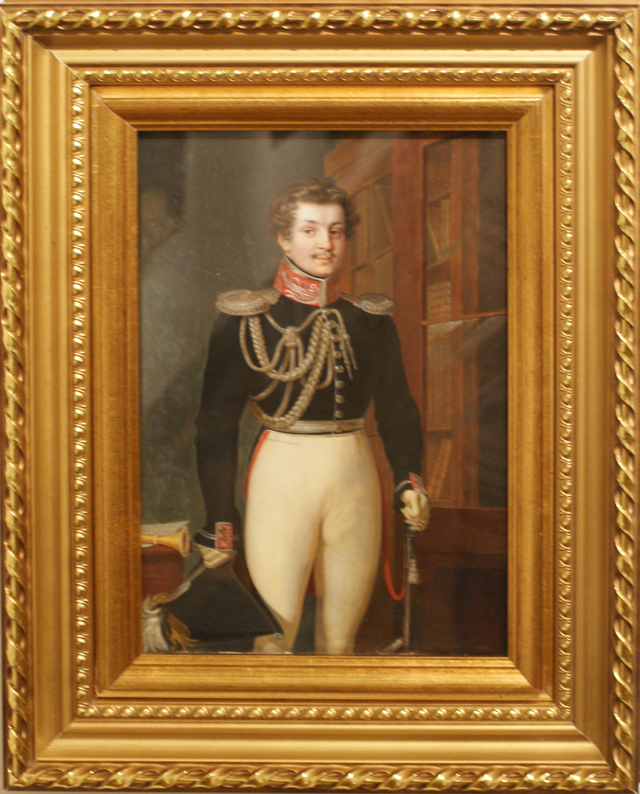 Партрэт П. П. Канаўніцына. Папера на метале, акварэль, бялілы